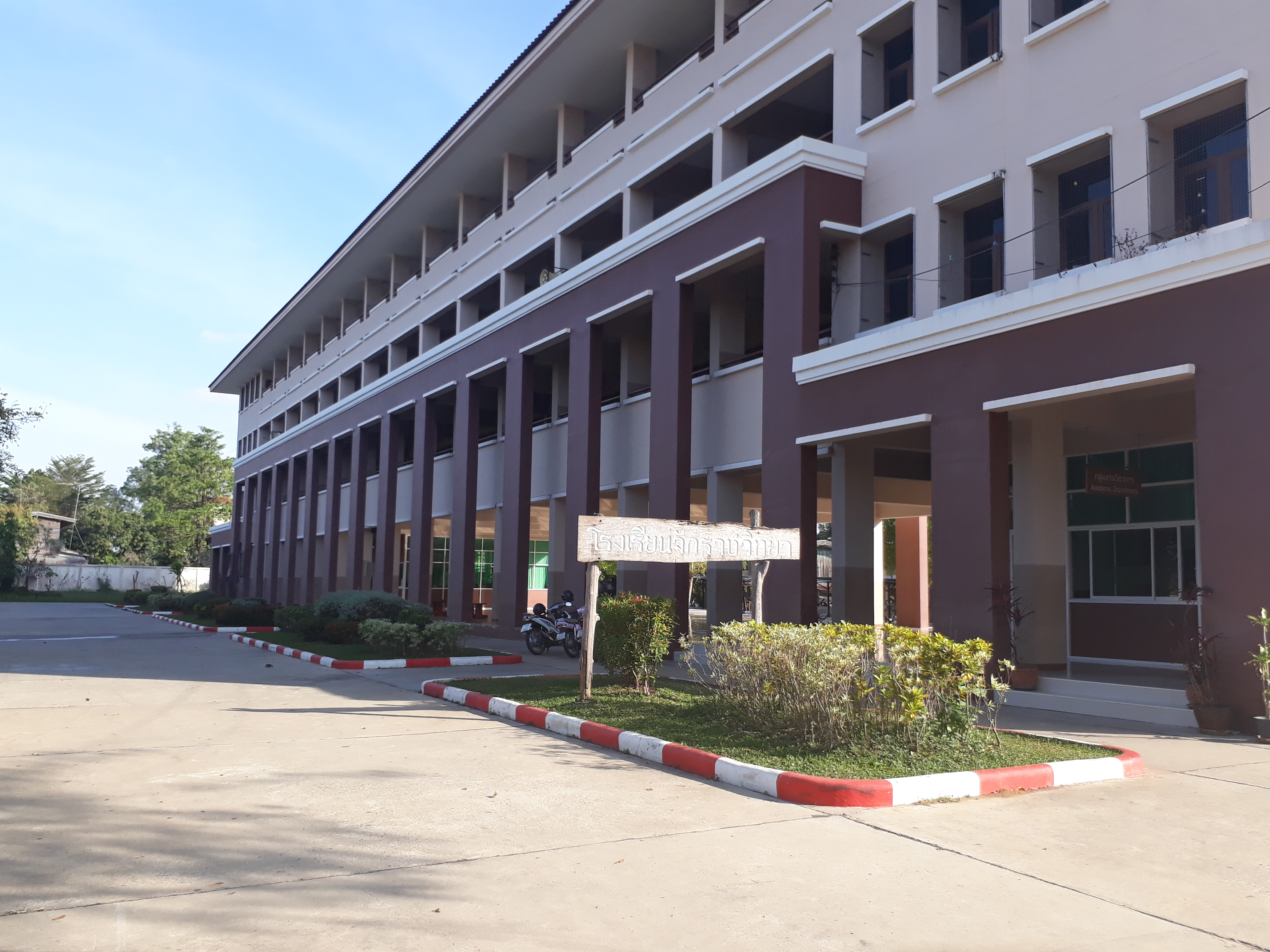 อาคาร4